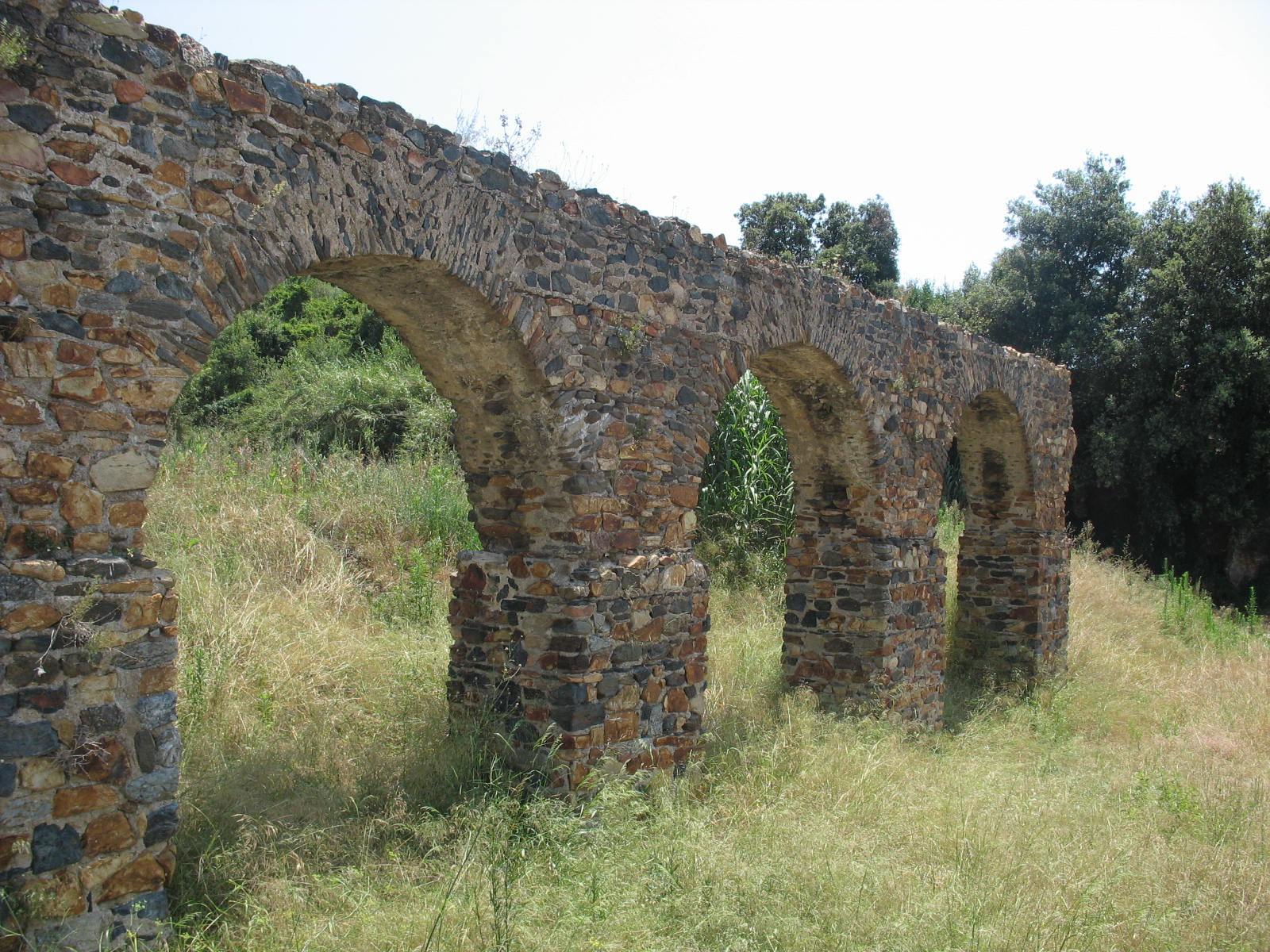 Aqüeducte romà de Can Cua a Pineda de Mar, el Maresme